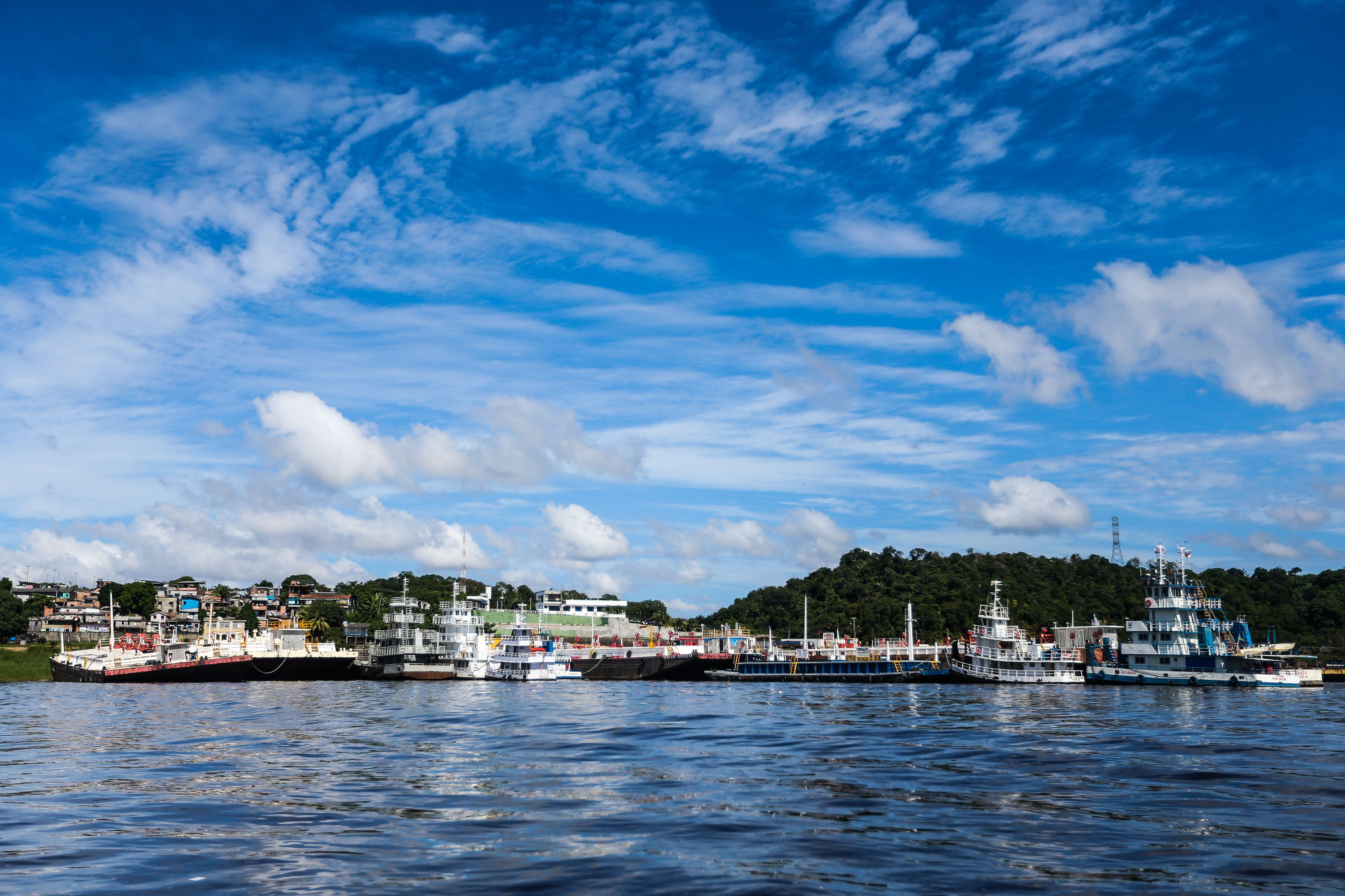 Porto da Ceasa, no Rio Negro, em Manaus